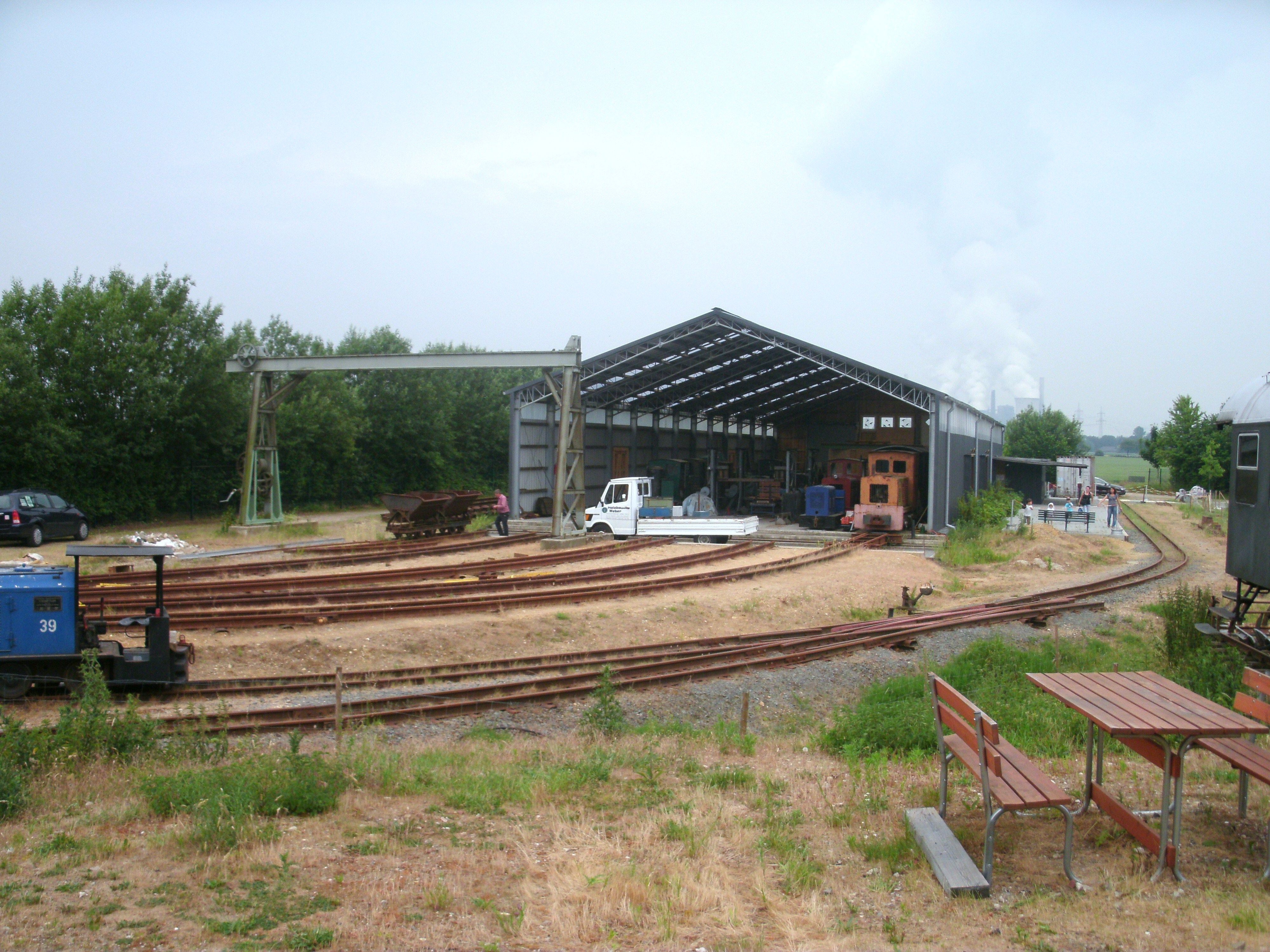 Die neue Museumshalle der Gillbachbahn (Feldbahnmuseum Oekoven) mit Gleisvorfeld (Schiebebühne) und dem Haltepunkt Neurather Feld (rechts)